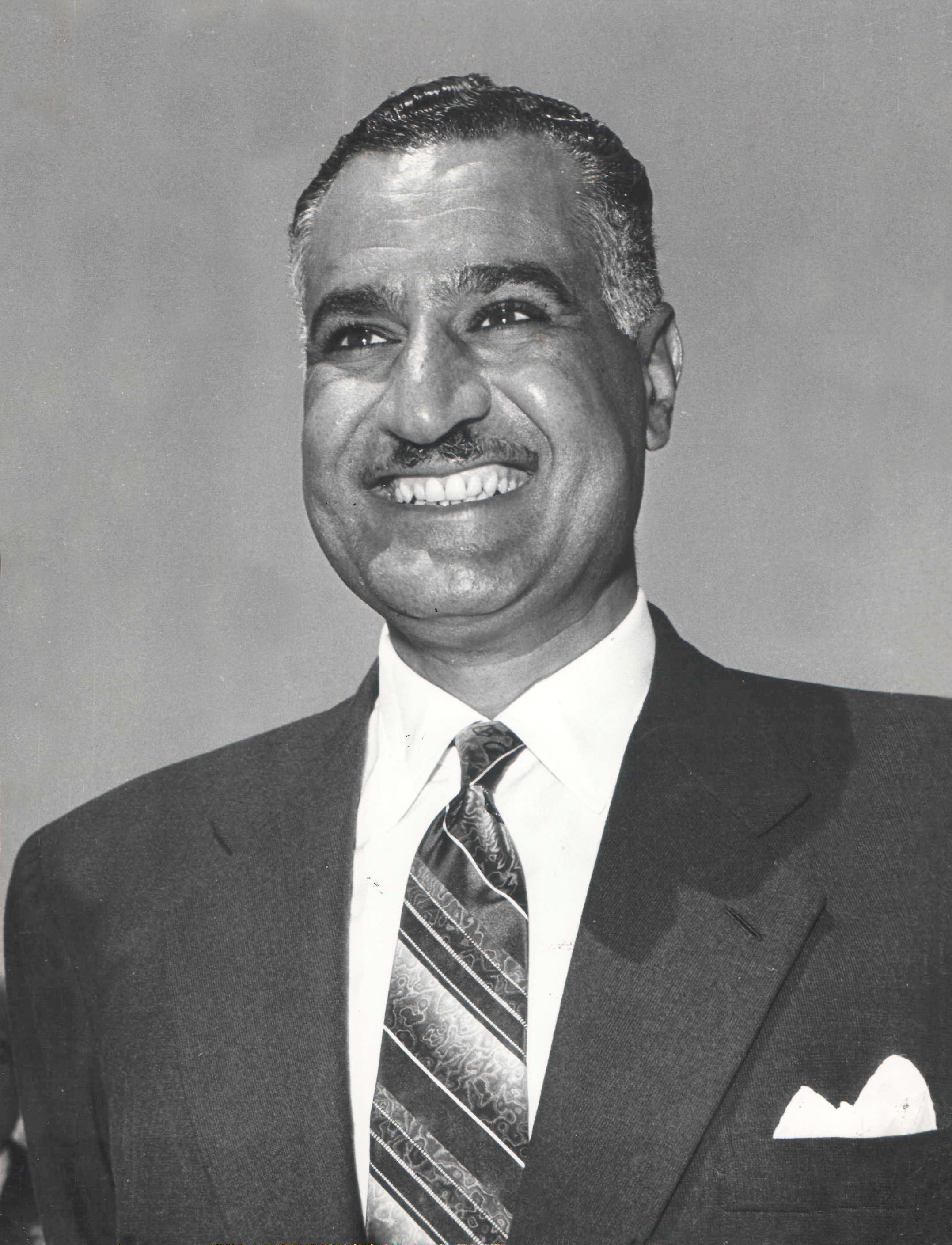 Gamal Abdel Naser u Beogradu, 1962.Foto: Stevan Kragujević (po odobrenju kćerke Tanje Kragujević)